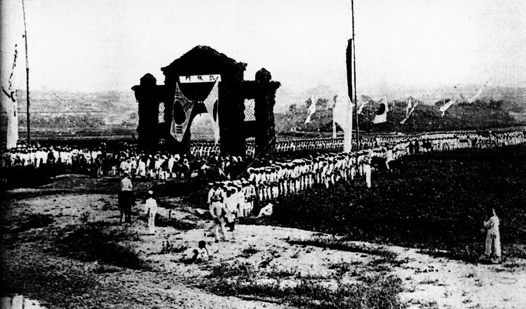 日清戦争 成歓の戦いからの凱旋 1894年8月5日